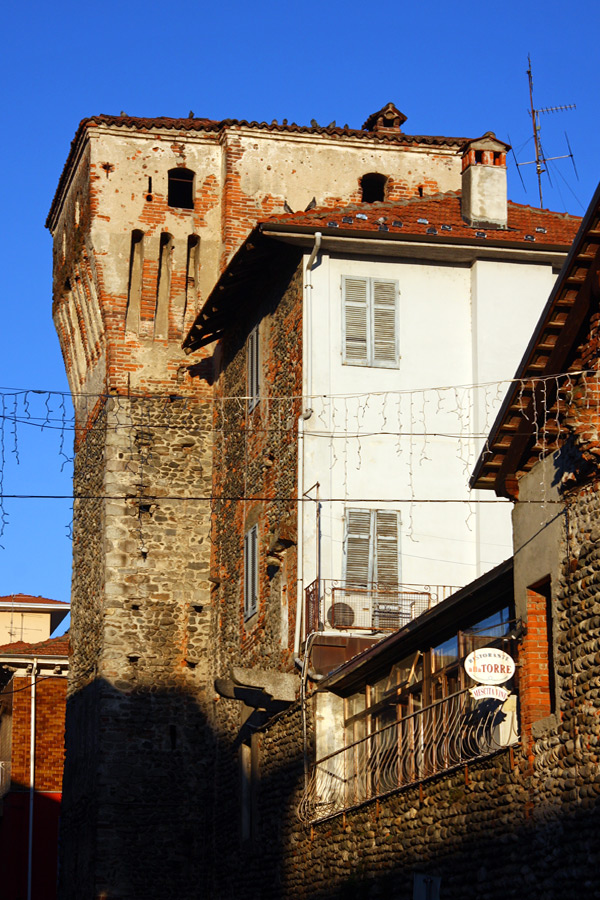 Torre o Torrione del Pretorio a Romagnano Sesia (NO)